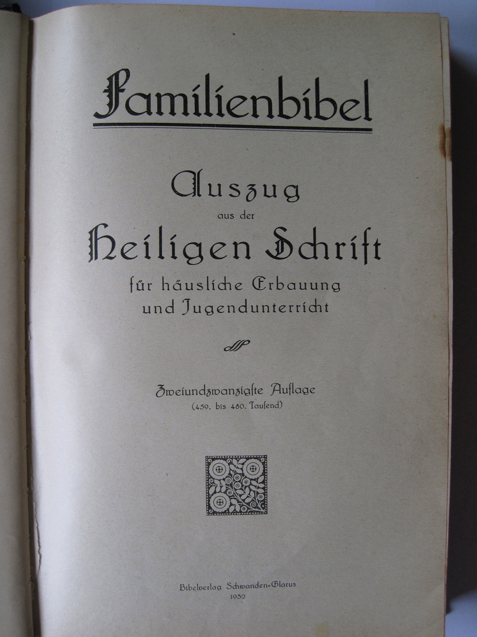 Glarner Familienbibel, 1932, Titelblatt